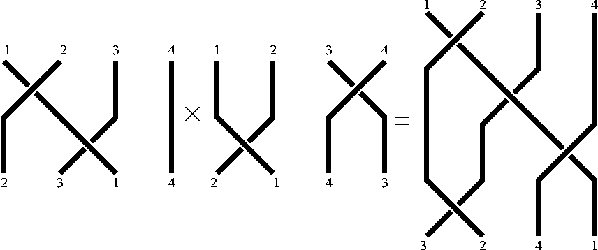 diagramme tresse